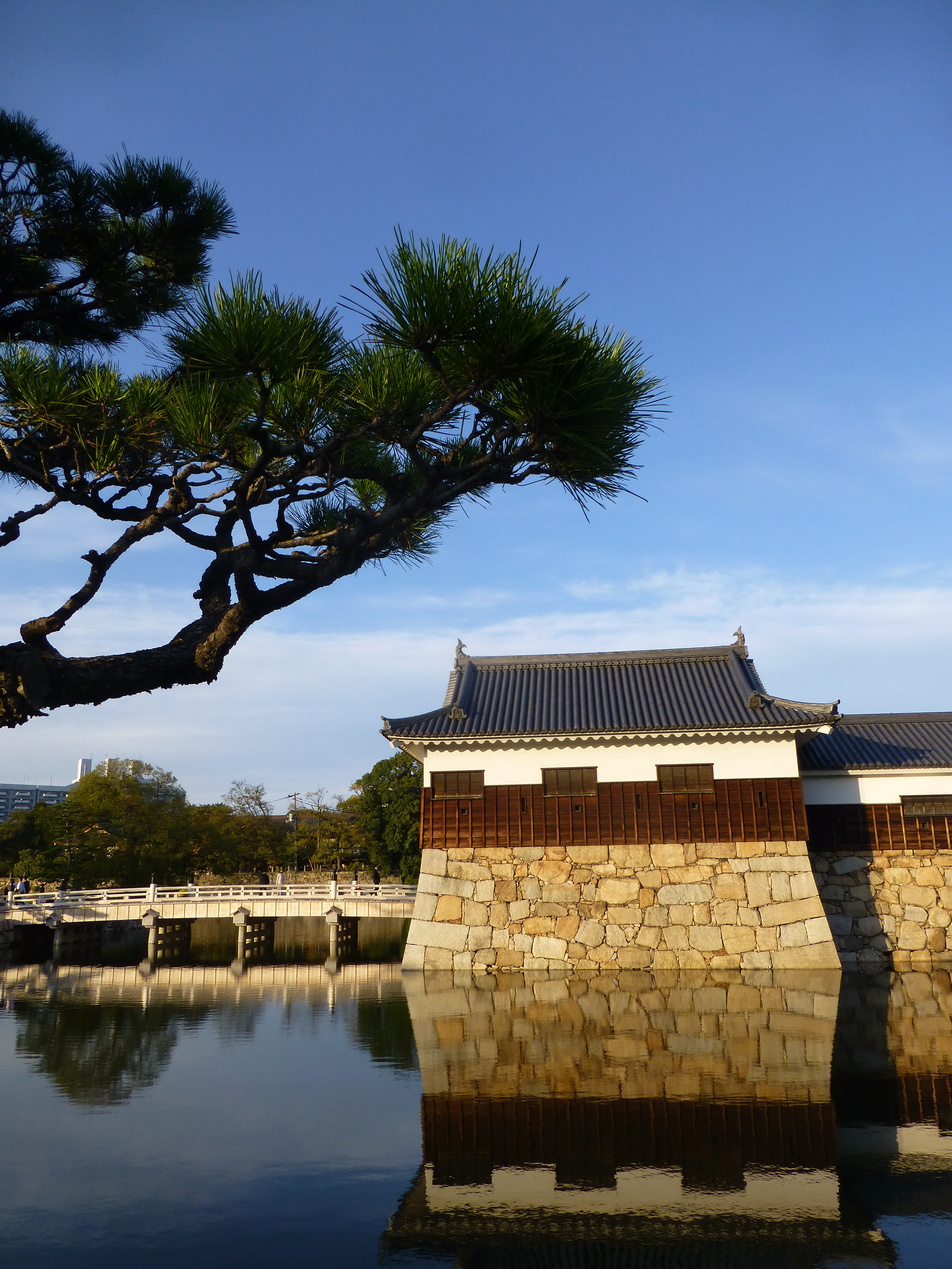 Entrée et douves du château d'Hiroshima, Japon